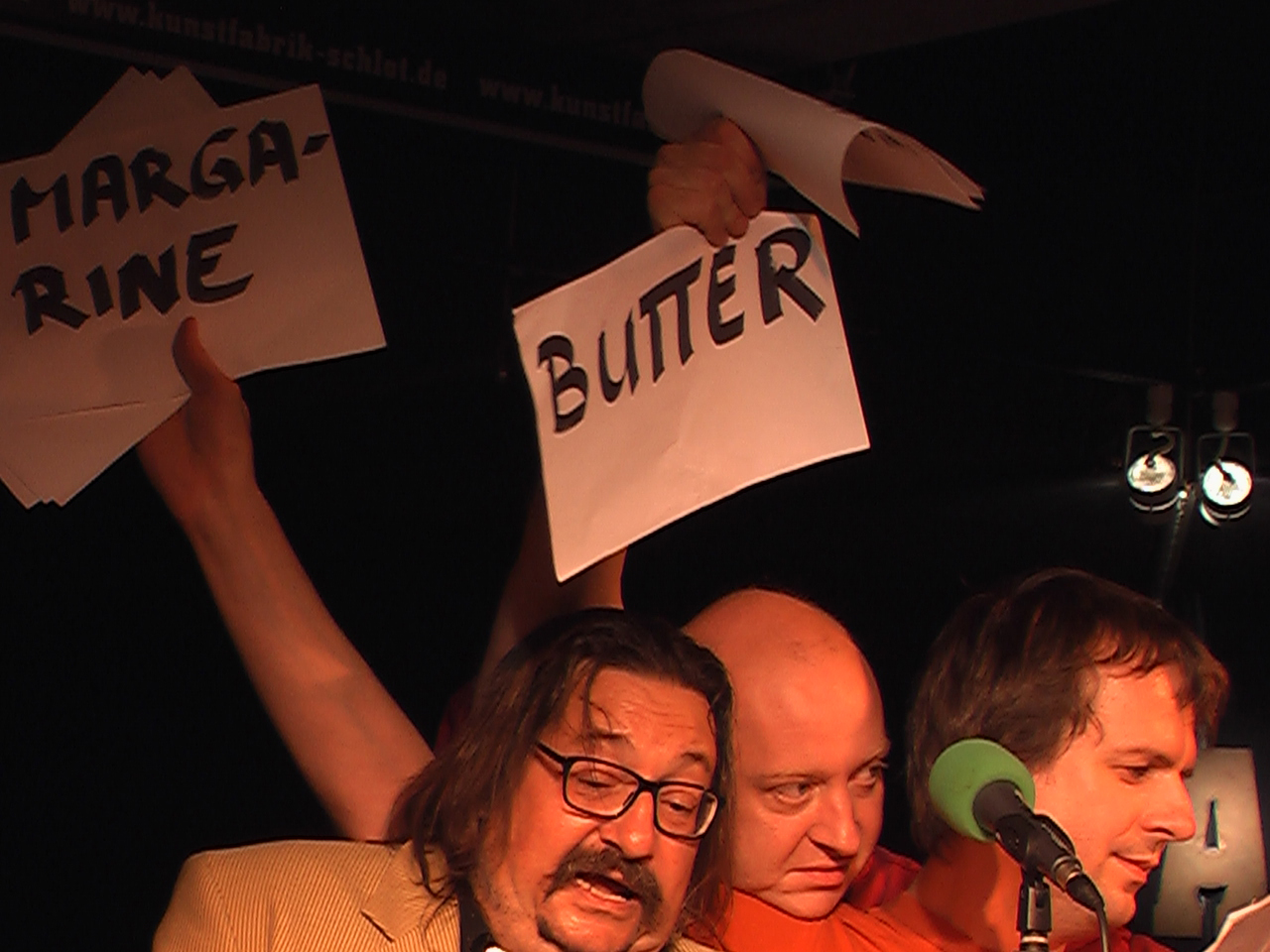 Das Mittwochsfazit im Schlot (Berlin-Mitte) mit Manfred Maurenbrecher, Horst Evers und Bov Bjerg (v.l.n.r.)